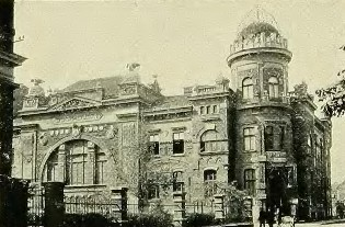 Polský dům